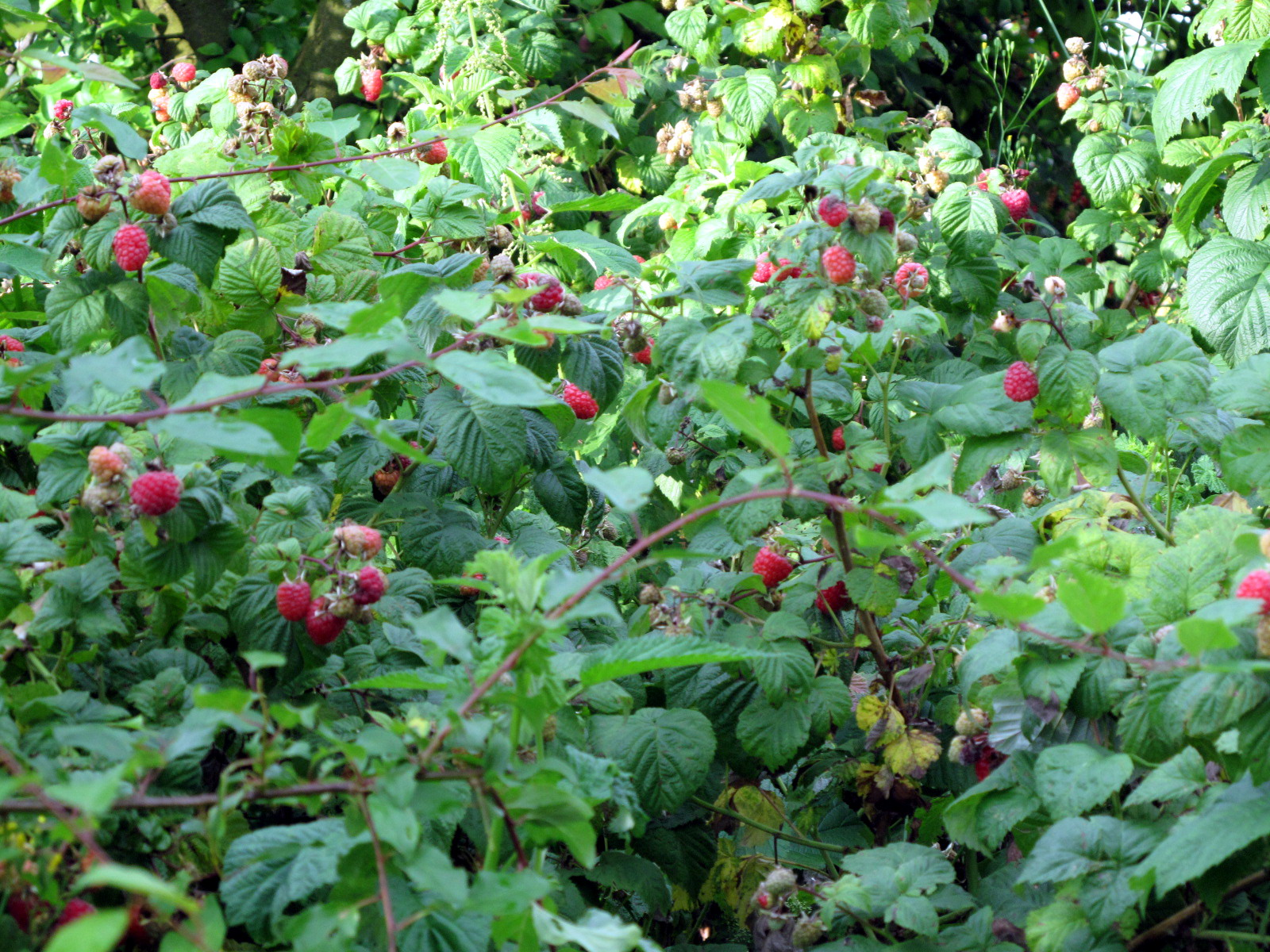 Maliny